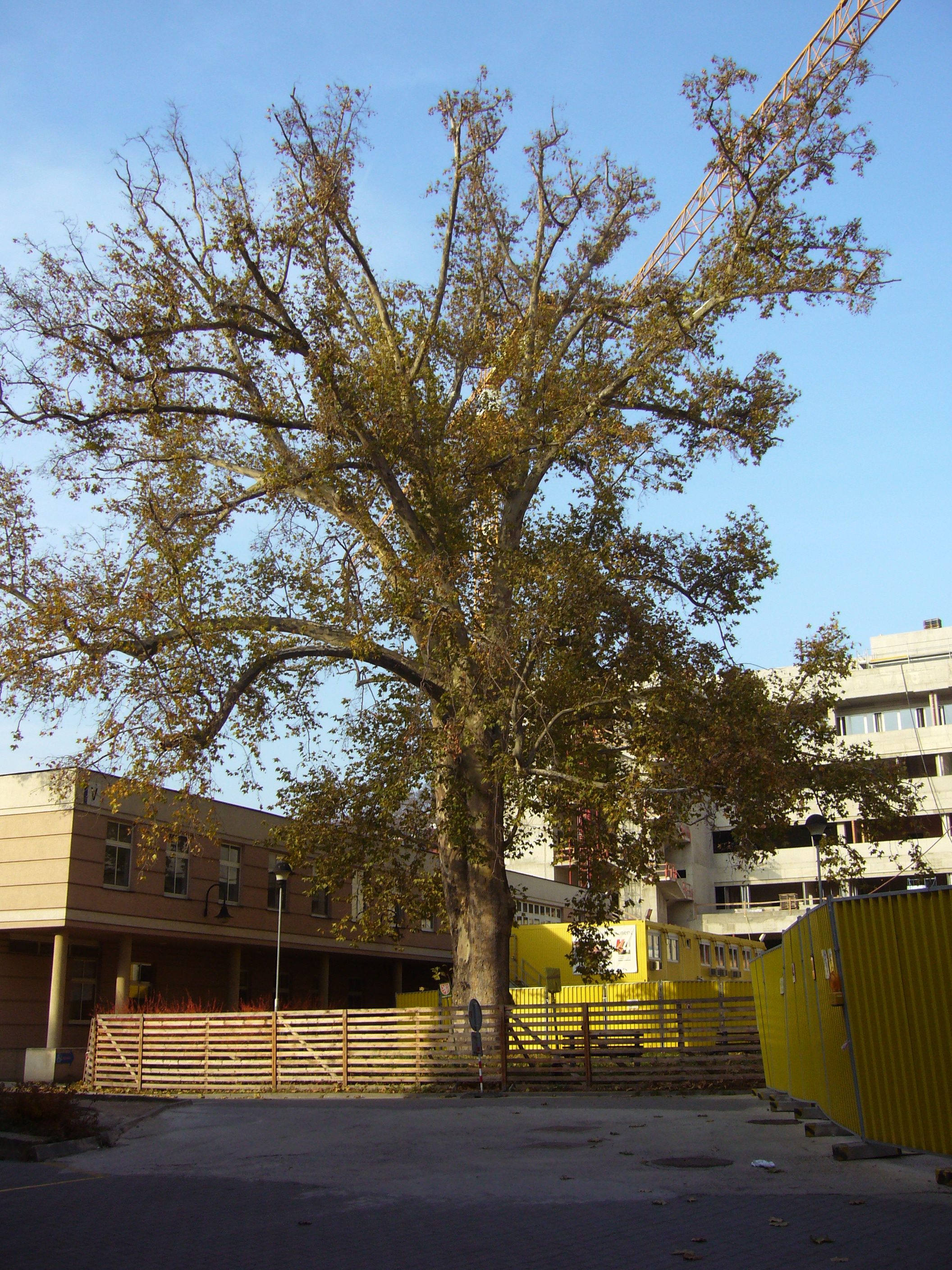 Platan v areálu nemocnice u Sv. Anny v Brně. V jeho těsné blízkosti probíhá od roku 2010 stavba mezinárodního chirurgického centra.